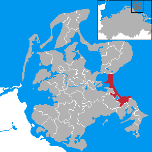 Binz, Landkreis Rügen, Mecklenburg-Vorpommern